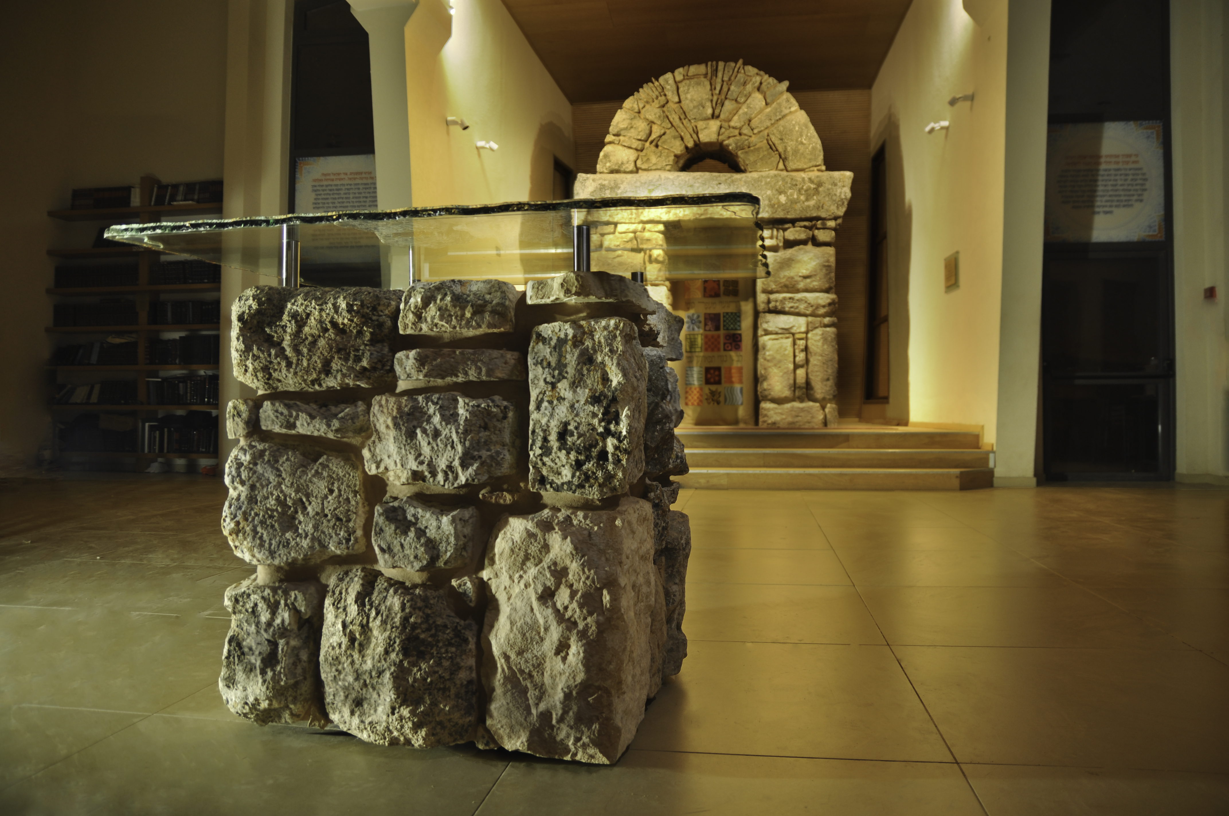 בימה עשויה מאבן מתכת וזכוכית, בהיכל ישיבת איתמר, יצירת האמן אסף קדרון